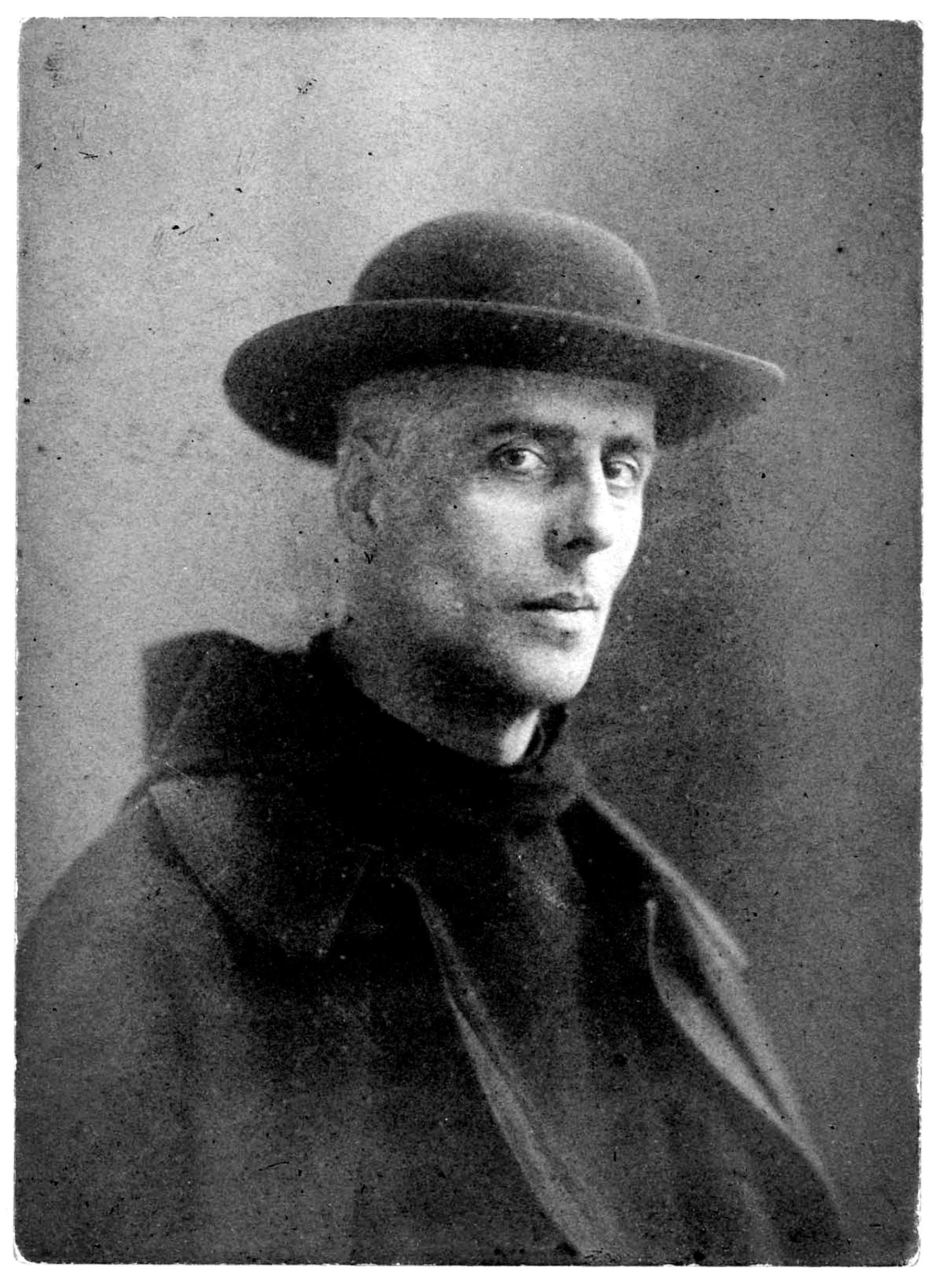 Jan Verkade (1868-1946) deutsch-niederländischer Benediktiner und Maler der Beuroner Schule